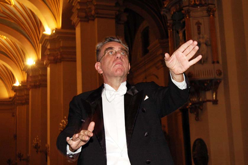 Maestro Jose Quezada Macchiavello